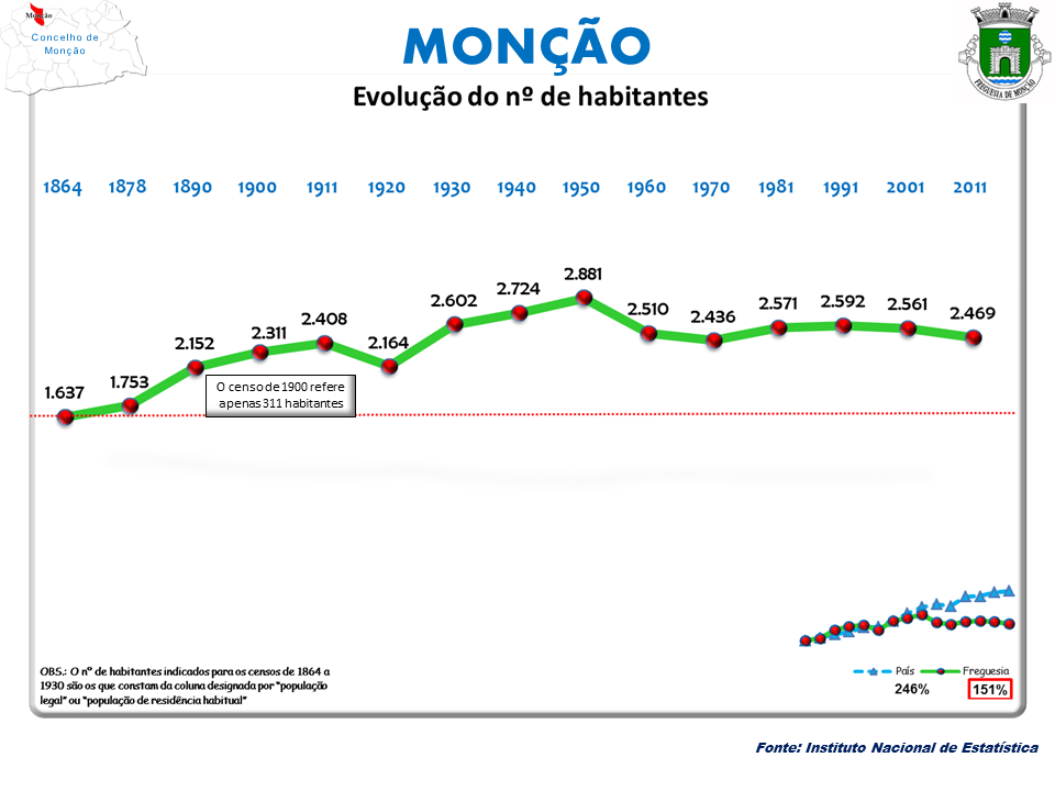 Censos 1864/2011